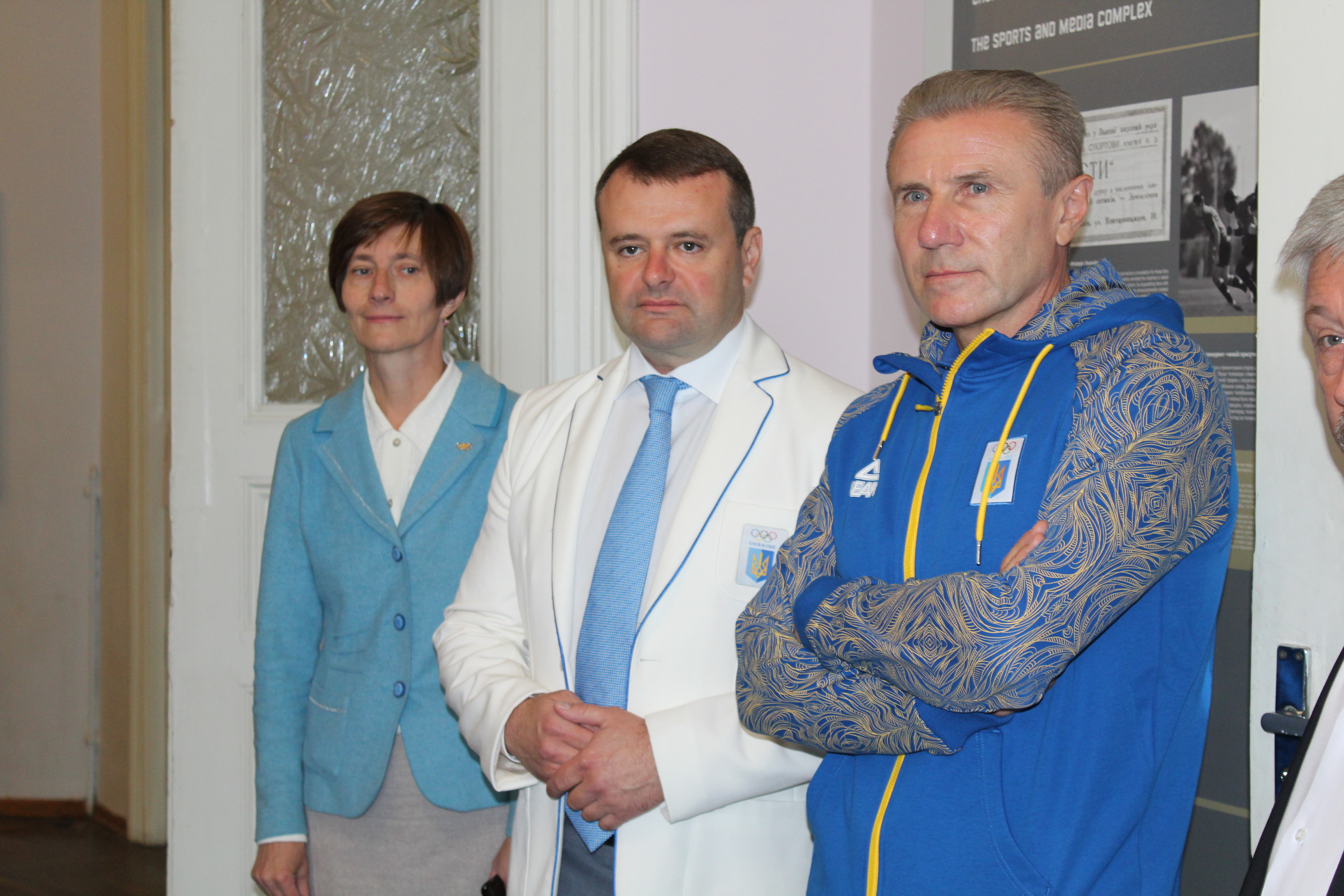 Вацеба Оксана Михайлівна |Оксана Вацеба , Юрій Турянський та Сергій Бубка у Львівському державному університеті фізкультури